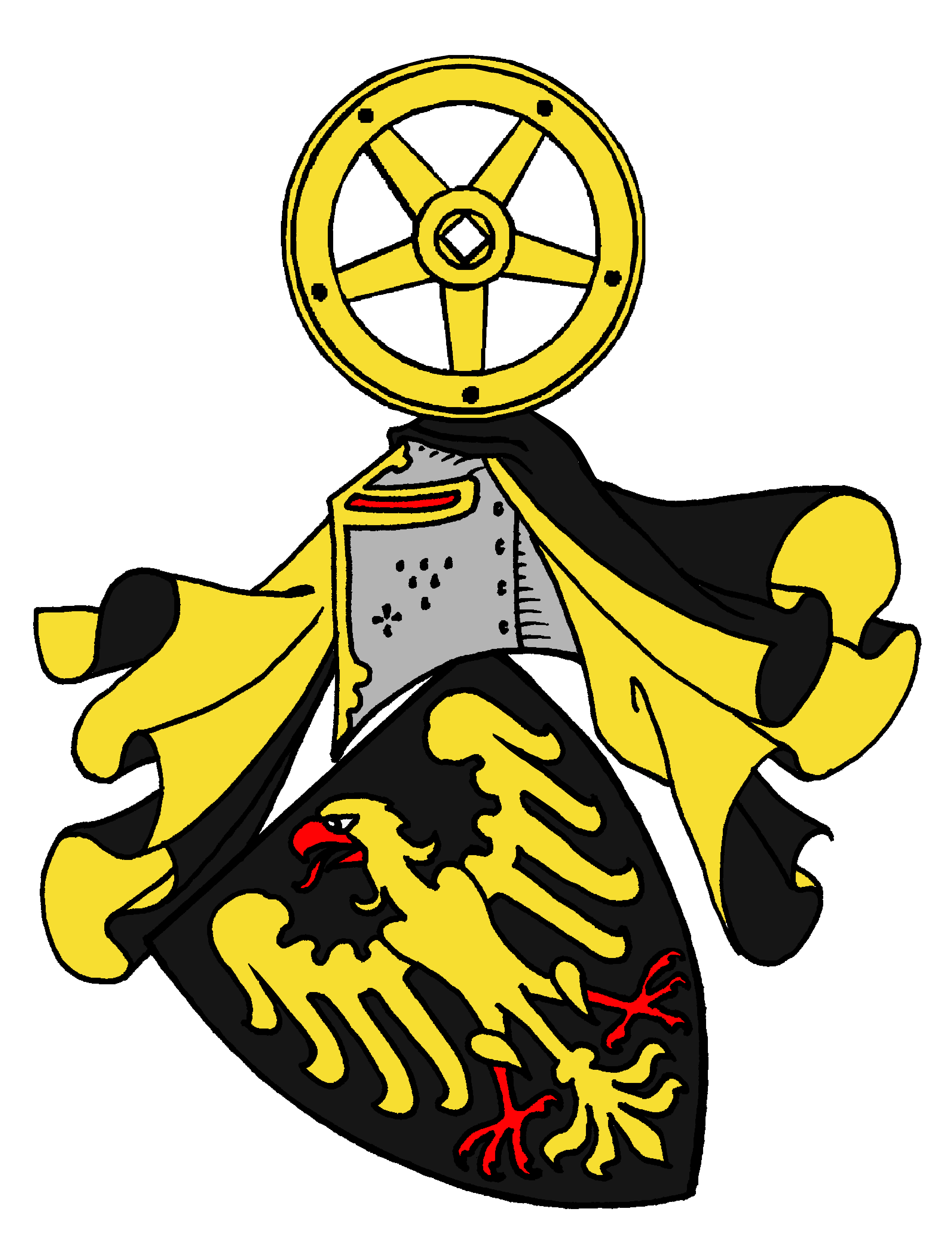 Stammwappen der Edlen Herren von Saffenberg: „In Schwarz ein goldener Adler. Helmzier ein goldenes Speichenrad. Helmdecken schwarz-golden.“ Die Stammburg des Geschlechts, die um 1080 erbaute Saffenburg hoch über der Ahr, ist heute eine Ruine im Landkreis Ahrweiler. Burg und Reichsherrschaft wurden nach dem Aussterben der Edelherren von Saffenberg geteilt. Ein Teil kam an die Grafen von Sponheim und dann durch Heirat an Dietrich IV von Kleve bzw. Mark. Der andere Teil gelangte an die Herren von Heinsberg, dann an Wilhelm von Arenberg, schließlich 1424 an die Grafen von Virneburg (Philipp I. Graf von Virneburg heiratete Katharina von Saffenberg) und nach deren Aussterben 1545 im Folgejahr an die Grafen von Manderscheid-Schleiden, nach deren Aussterben 1593 an die Grafen von der Mark-Schleiden, zuletzt 1773 an die Herzöge von Arenberg.